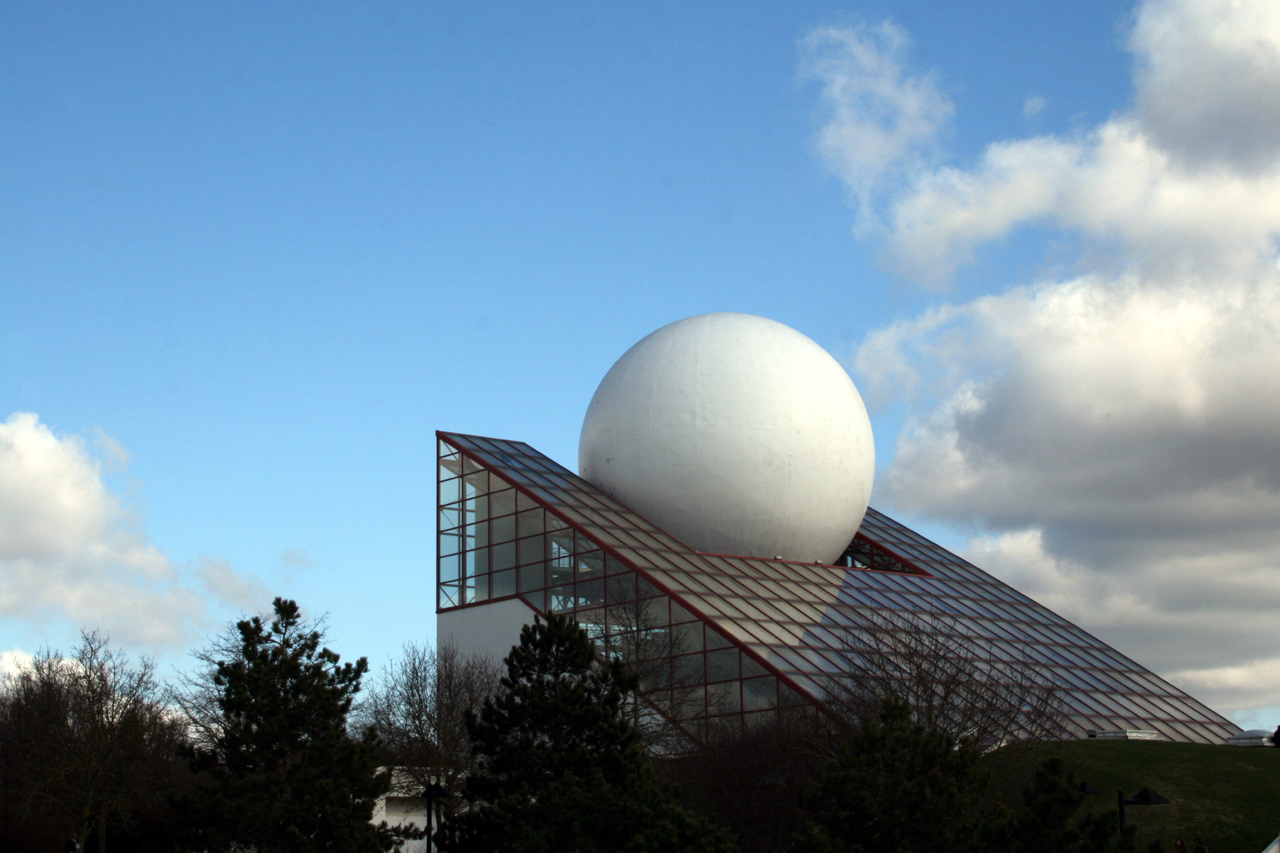 Batiment du Futuroscope